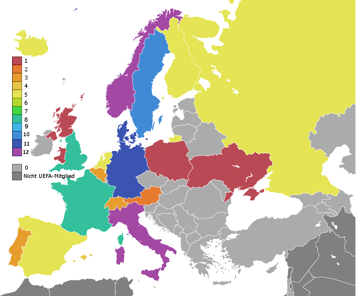 Teilnehmer an der Fußball-Europameisterschaft der Frauen Stand einschließlich EURO 2017